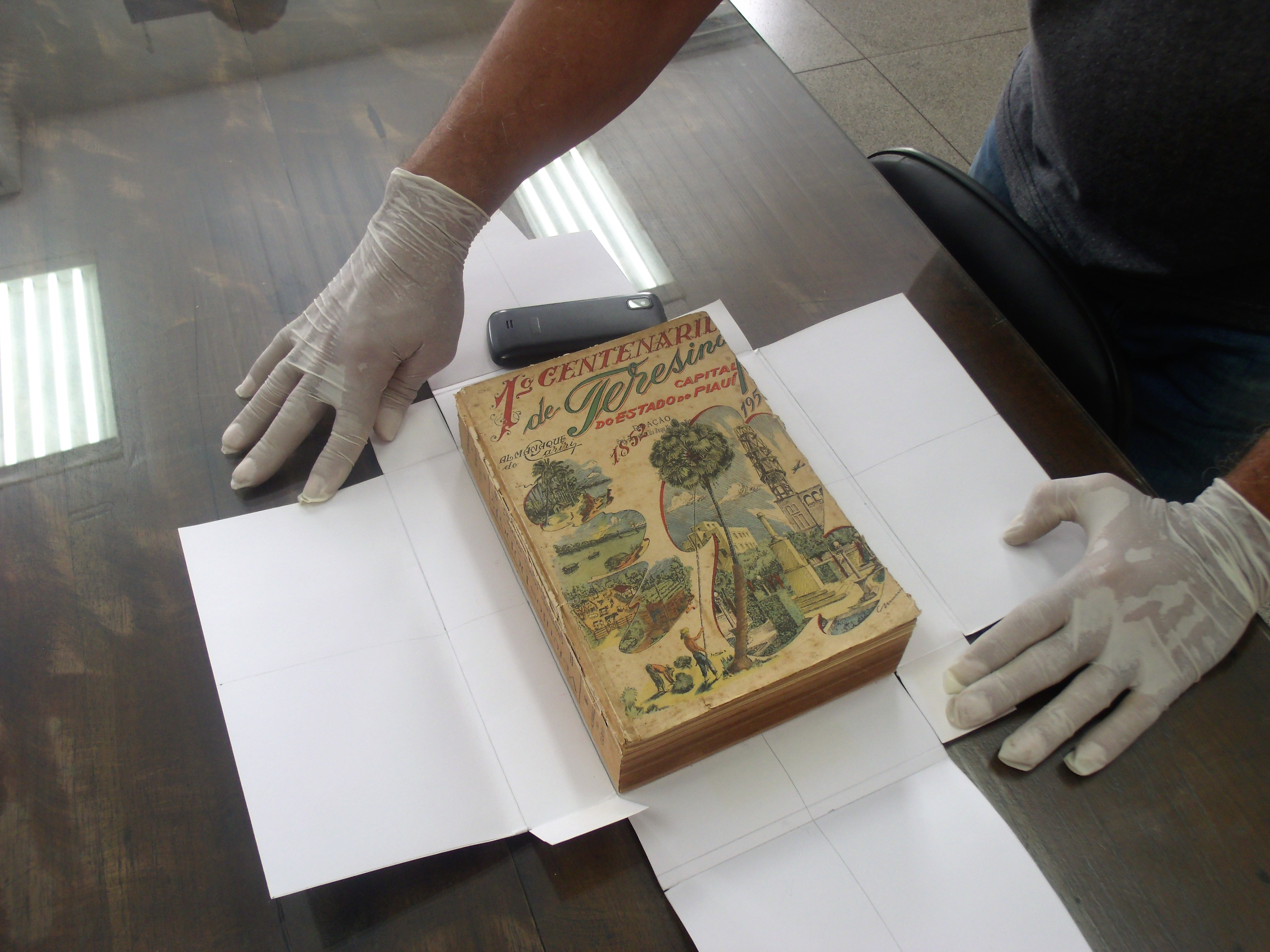 Almanaque do Cariri, edição de 1952, sob guarda do Arquivo Público do Estado do Piauí.